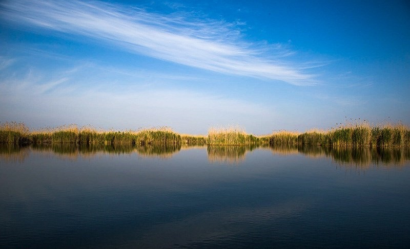 تالاب هورالعظیم